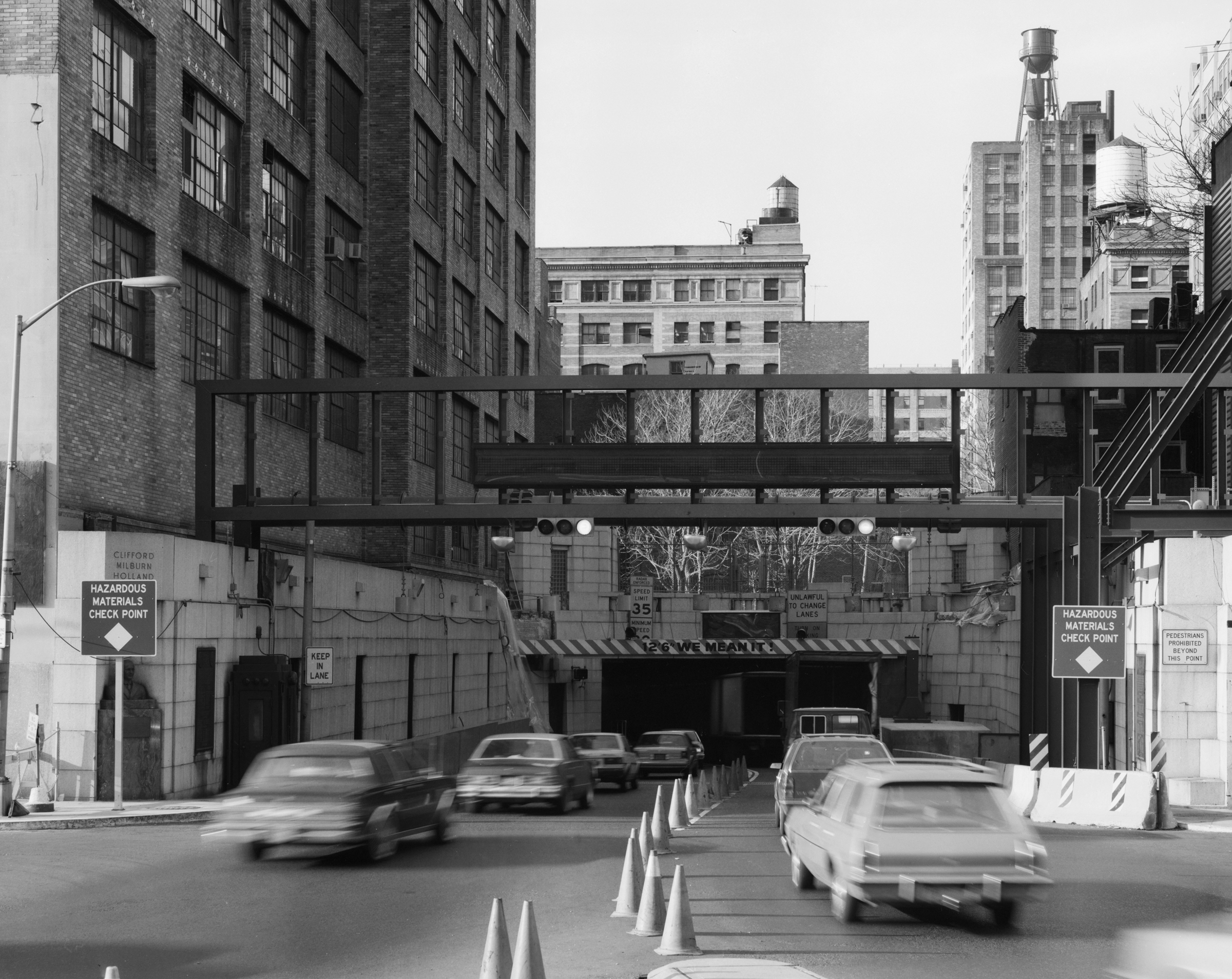 Holland tunnel entrance. HAER NY,31-NEYO,166-20